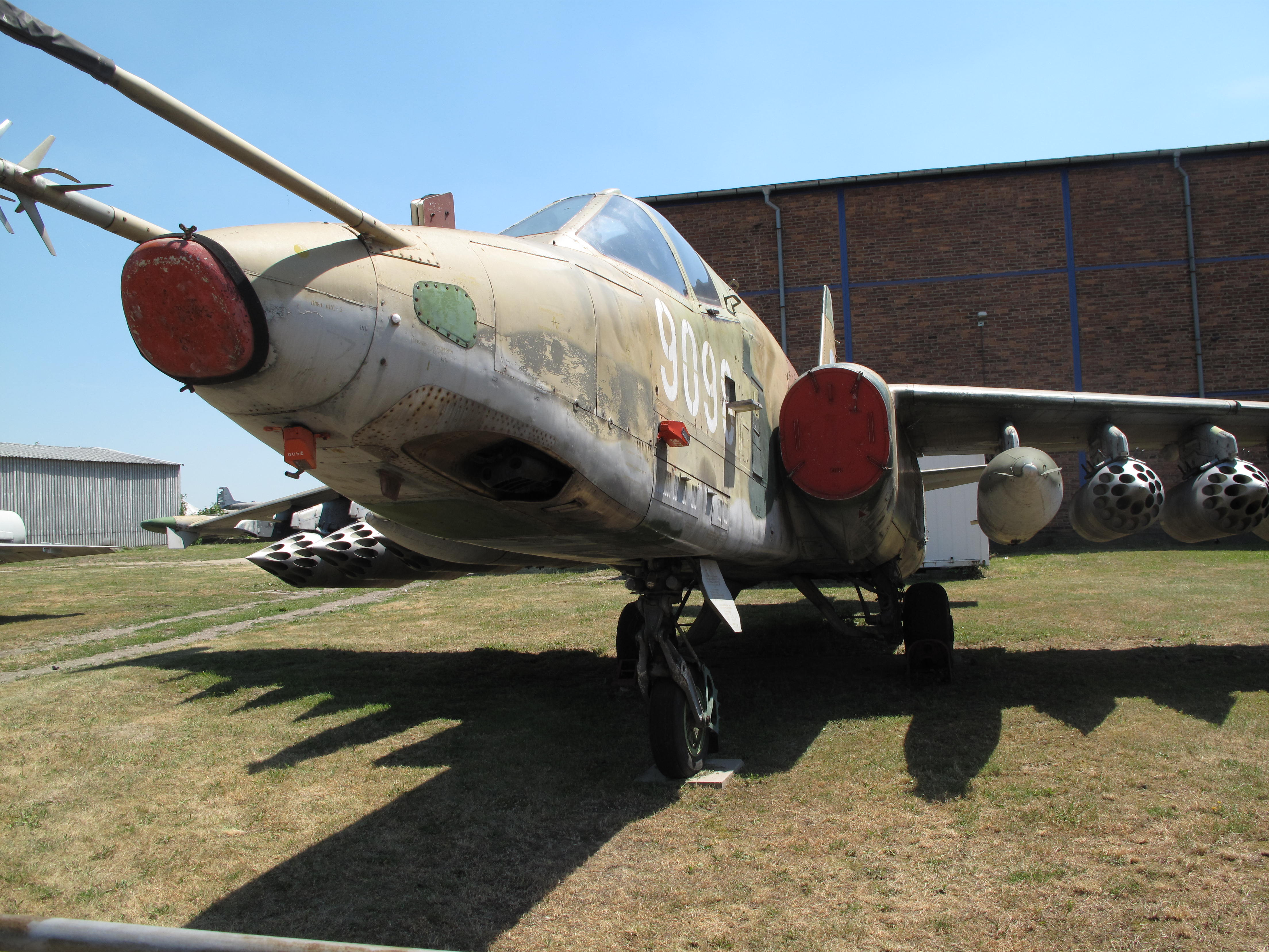 Letecké muzeum Kbely